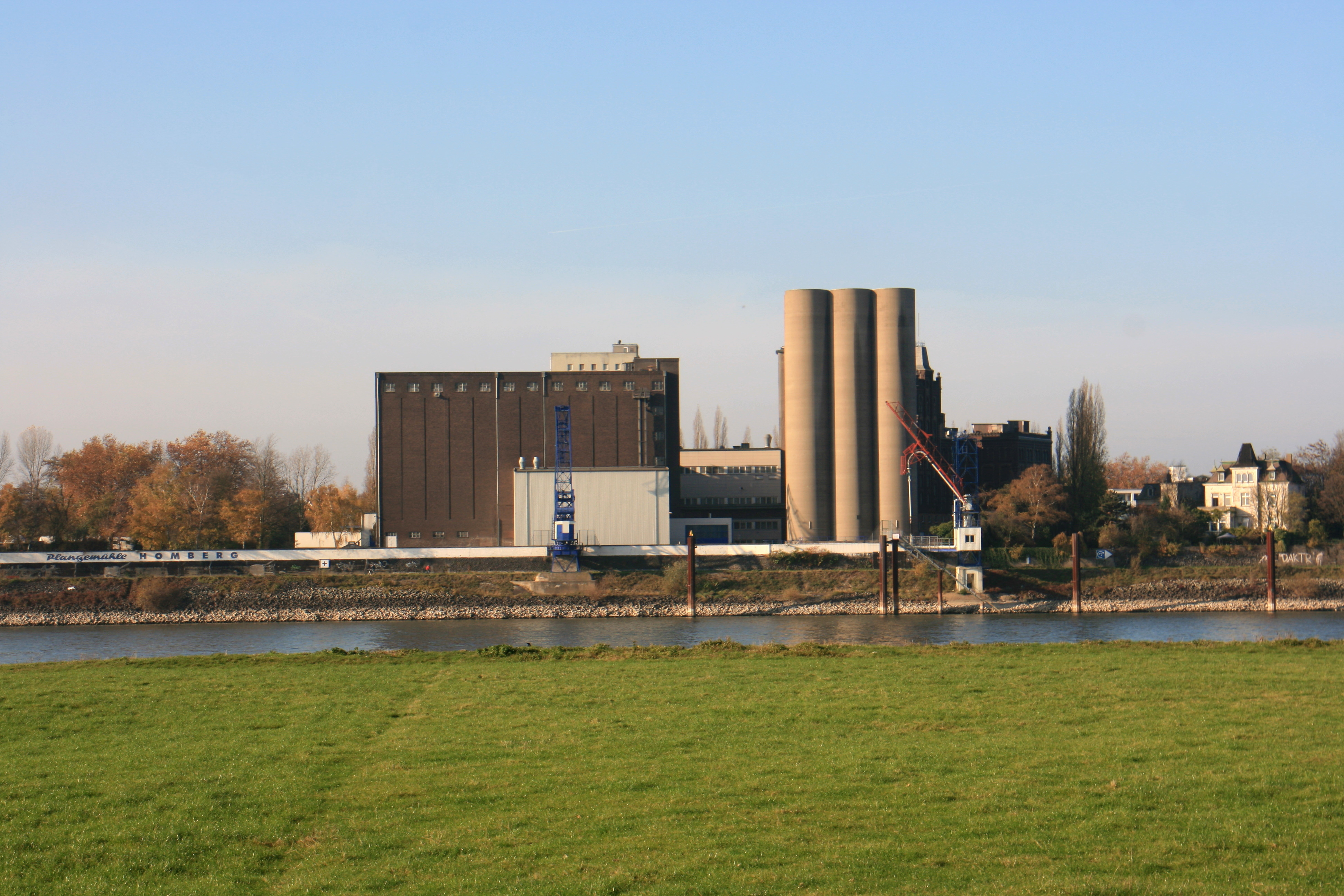 Blick von Am Bört über den Rhein auf die Plangemühle Homberg (an der Zechenstraße/Königstraße) in Duisburg